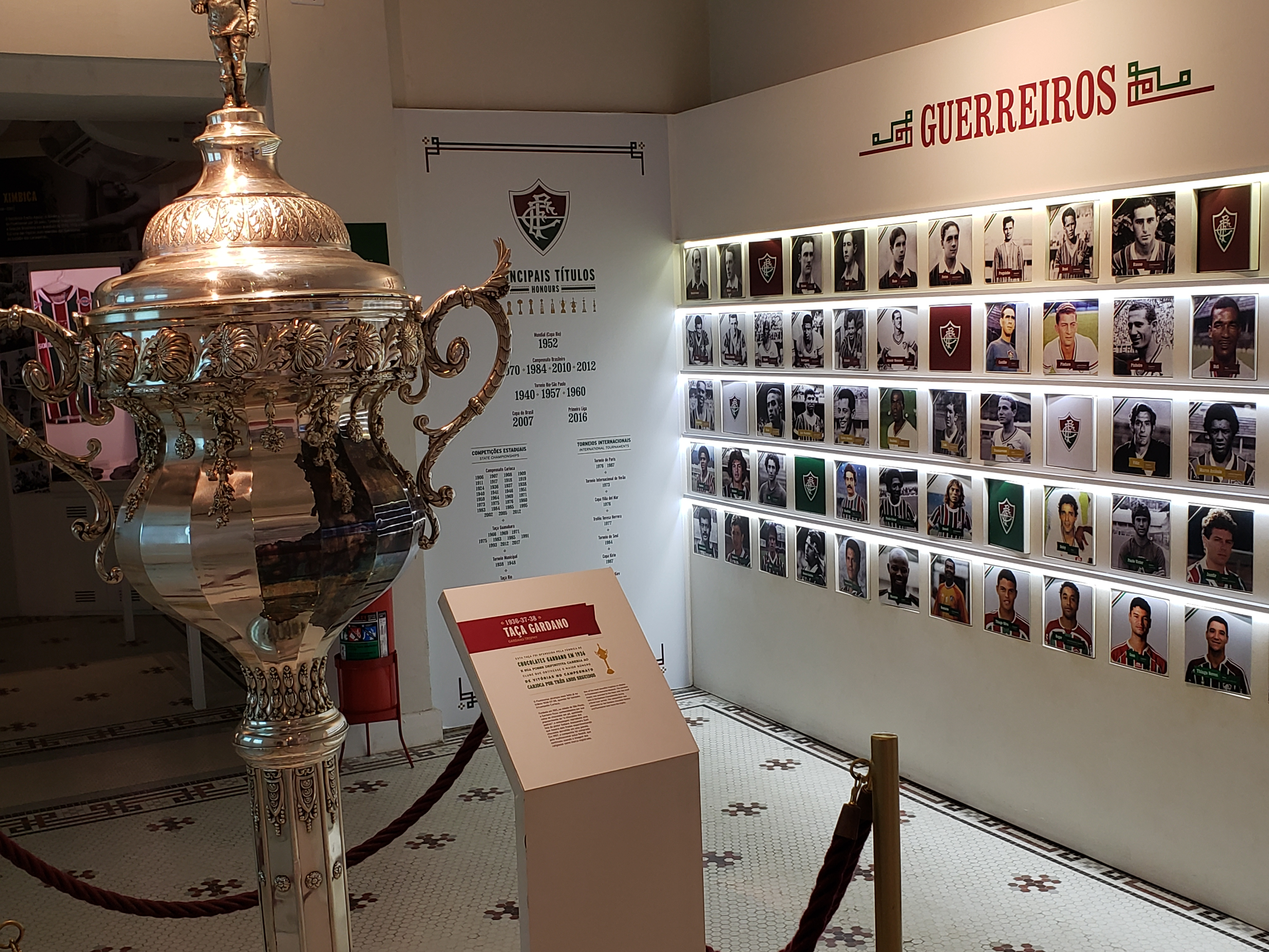 Ambiente de entrada da Sala de Troféus do Fluminense Football Club, destacando os principais títulos e jogadores, além de destacar a Taça Gardano, a maior do clube em tamanho e peso..